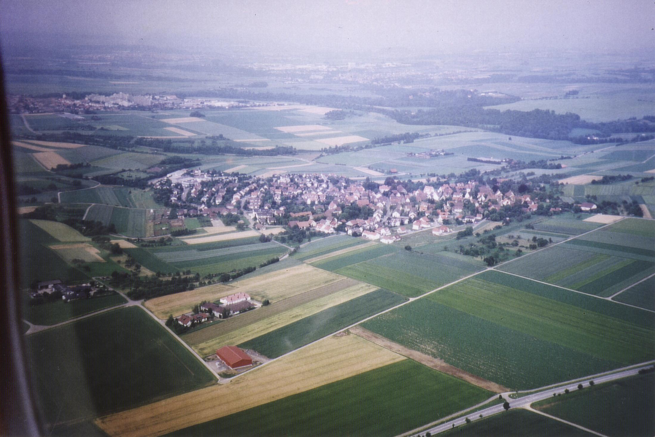 Schöckingen aus der Vogelperspektive